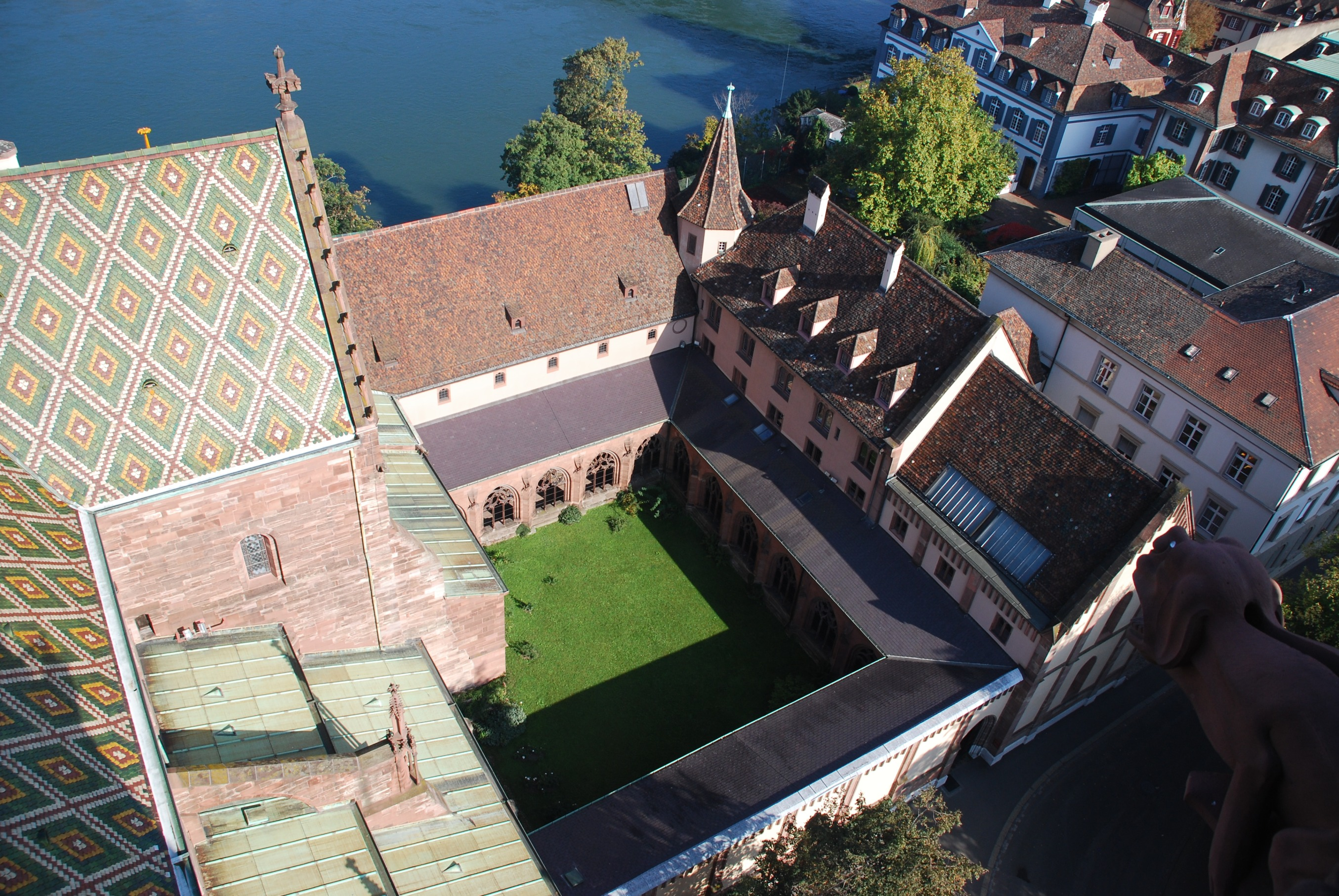 Großer Kreuzgang des Basler Münsters vom Martingsturm aus gesehen